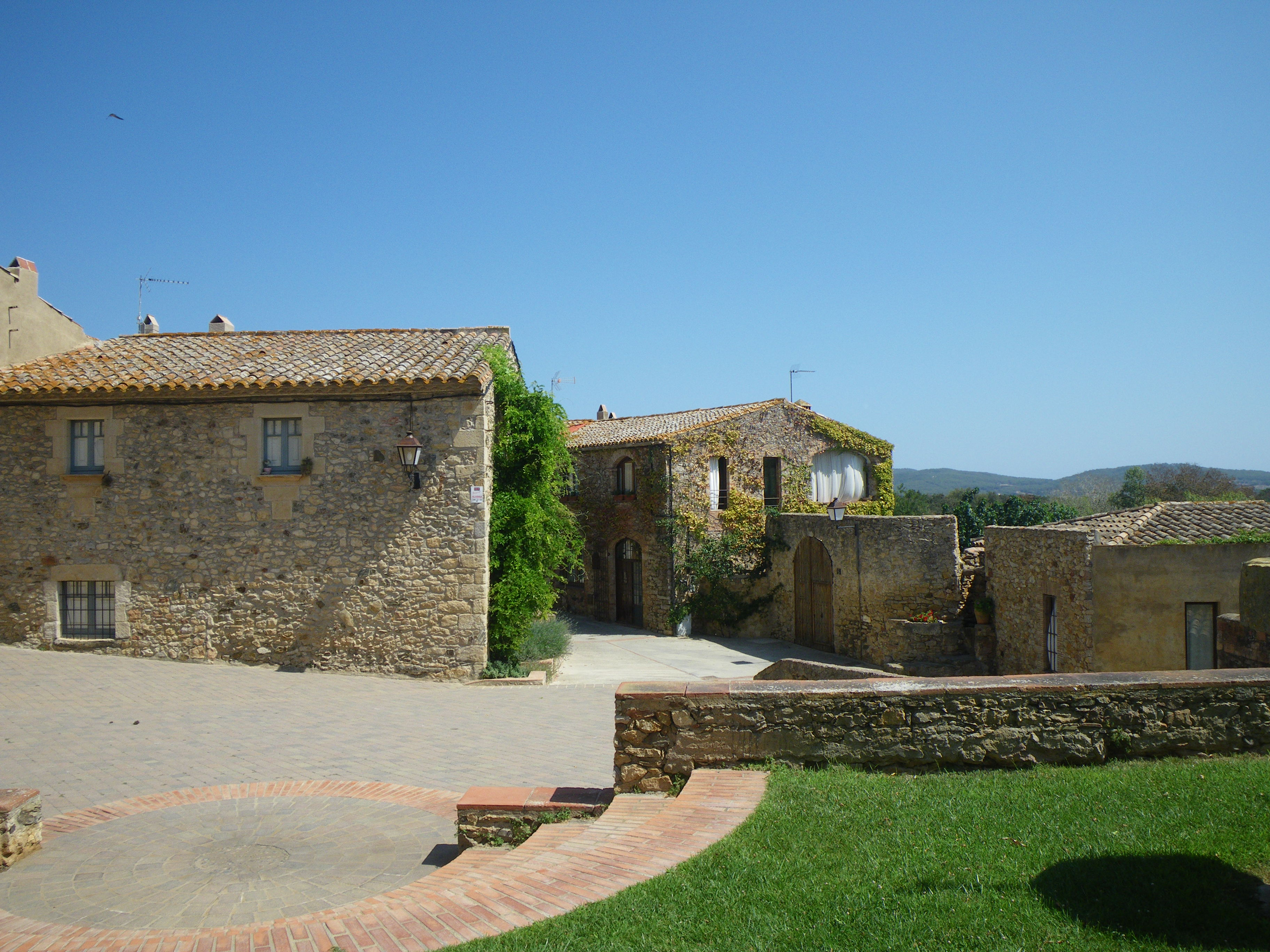 Plaça de l'esglèsia